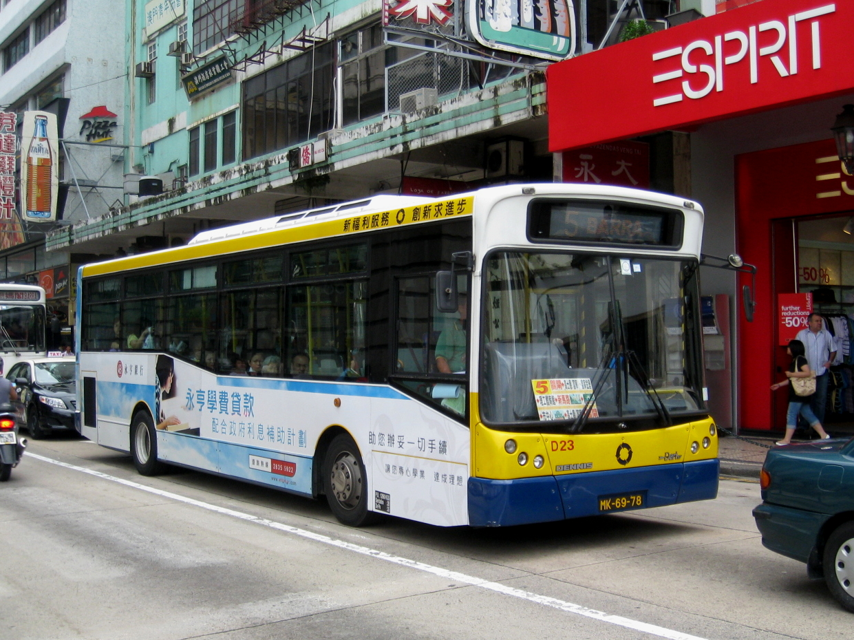 Transmac SARL D23